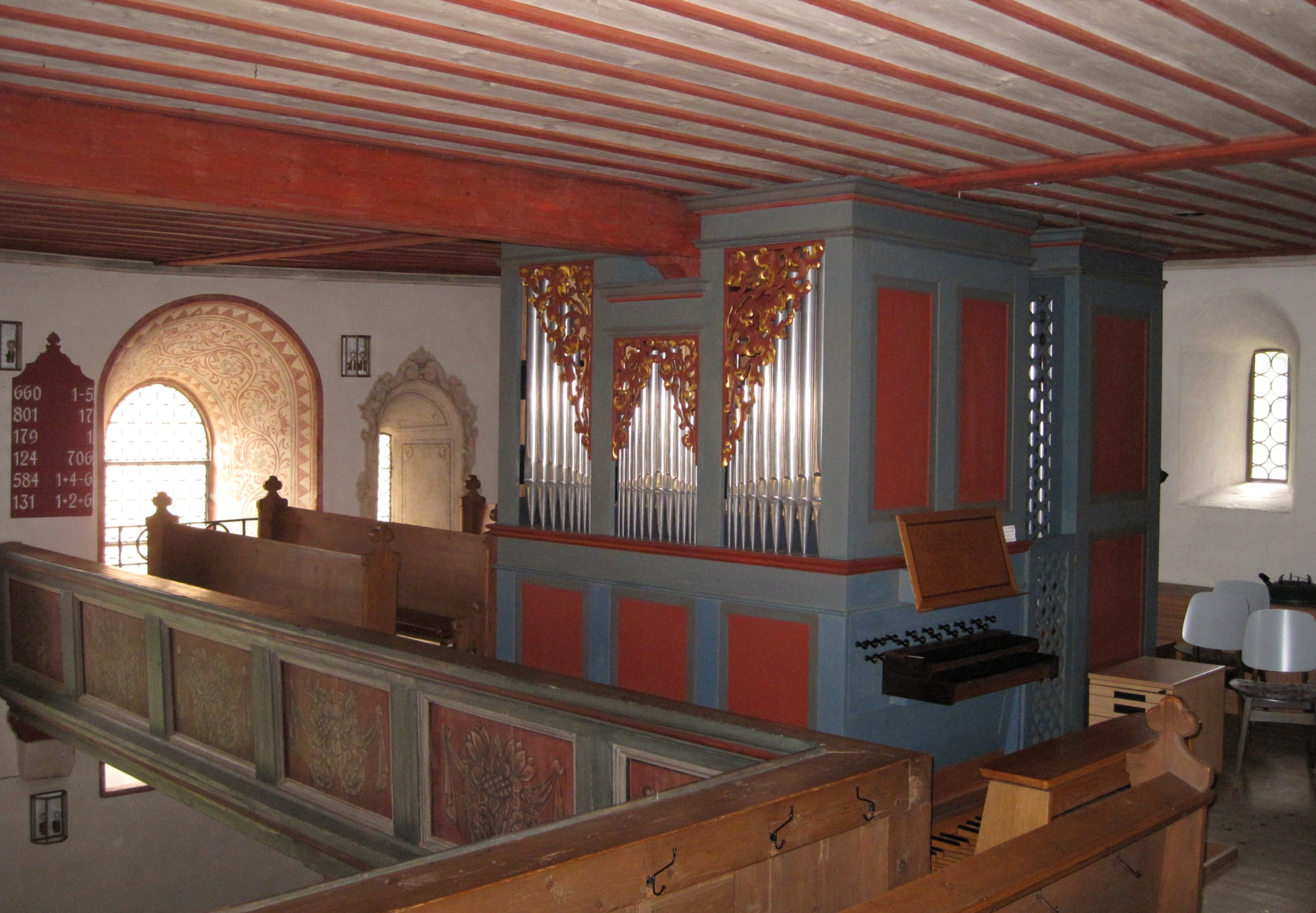 Schuke-Orgel in der Kirche St. Peter und Paul, Detwang 31 in Rothenburg ob der Tauber-Detwang. 17 Register (1188 Pfeifen), 1989 von der Firma Karl Schuke erbaut.